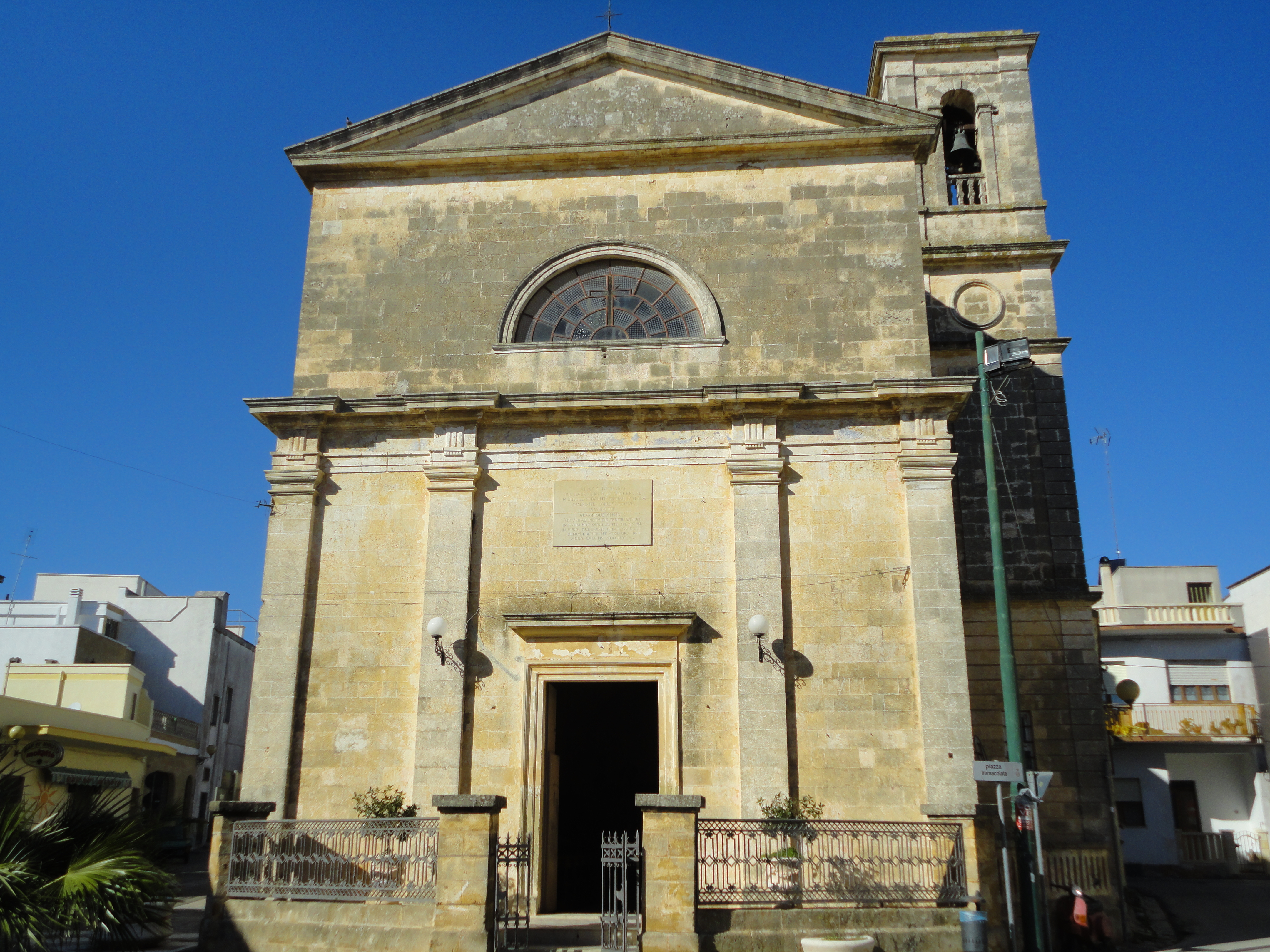 Chiesa dell'Immacolata Gagliano del Capo